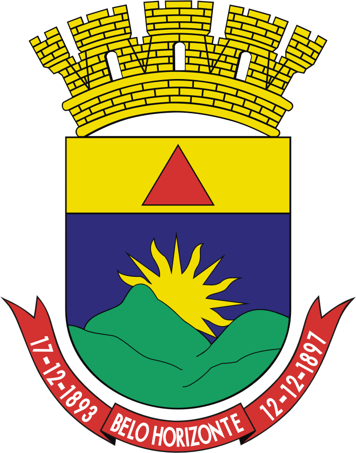 Brasão da cidade de Belo Horizonte, estado de Minas Gerais, Brasil / Coat of Arms of Minas Gerais's capital, Brazil